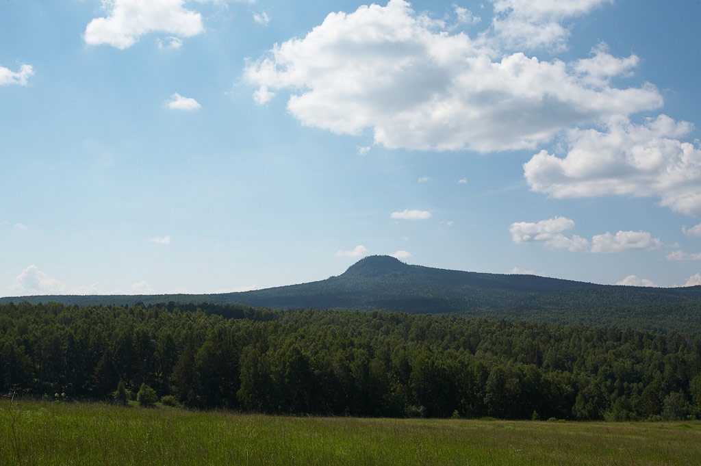 Черная сопка - высочайшая точка в окрестностях Красноярска, представляет собой потухший вулкан. Снимок сделан недалеко от с. Кузнецово Красноярского края.